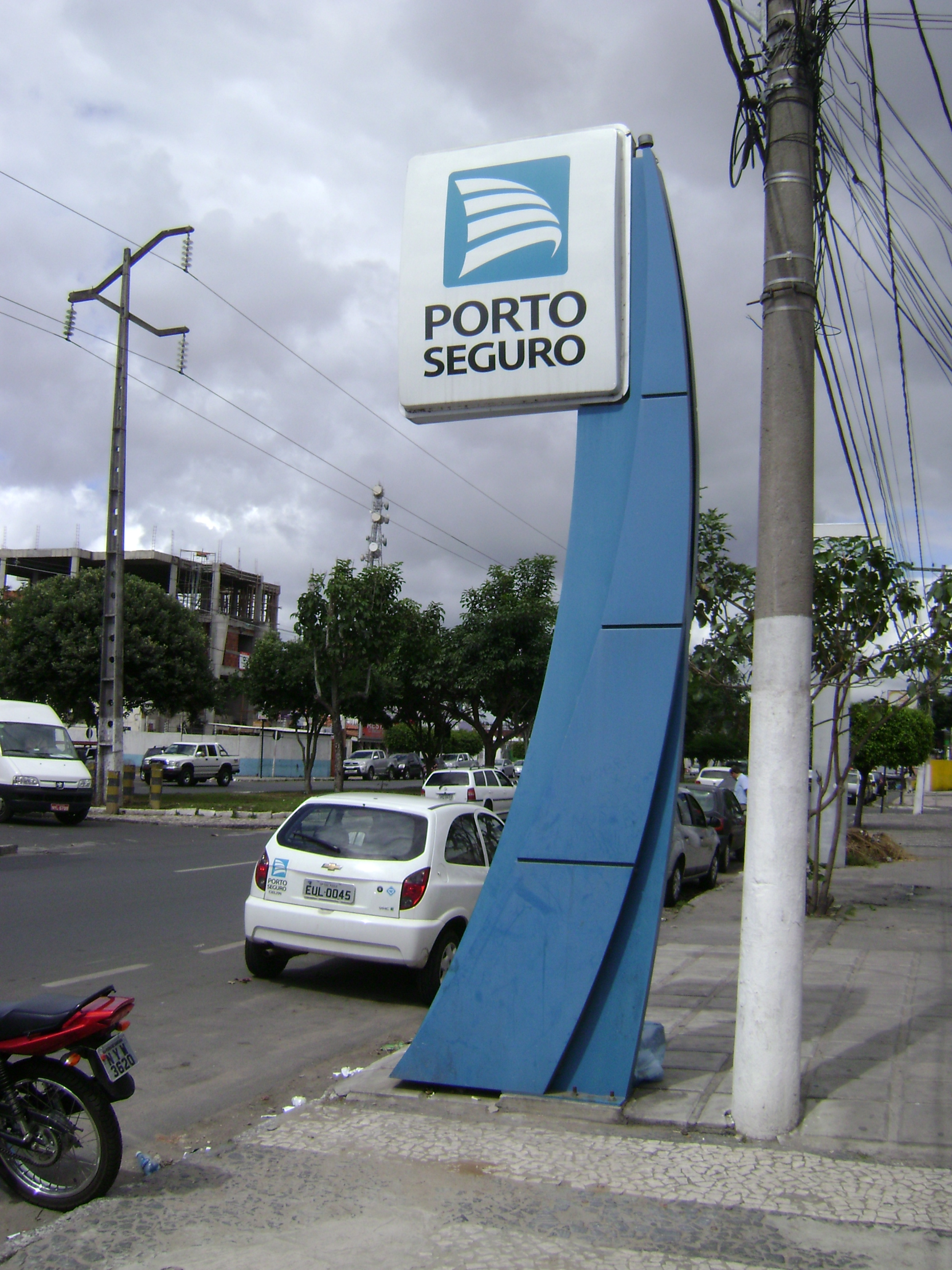 Inscrição da Porto Seguro em Feira de Santana, Bahia, Brasil.